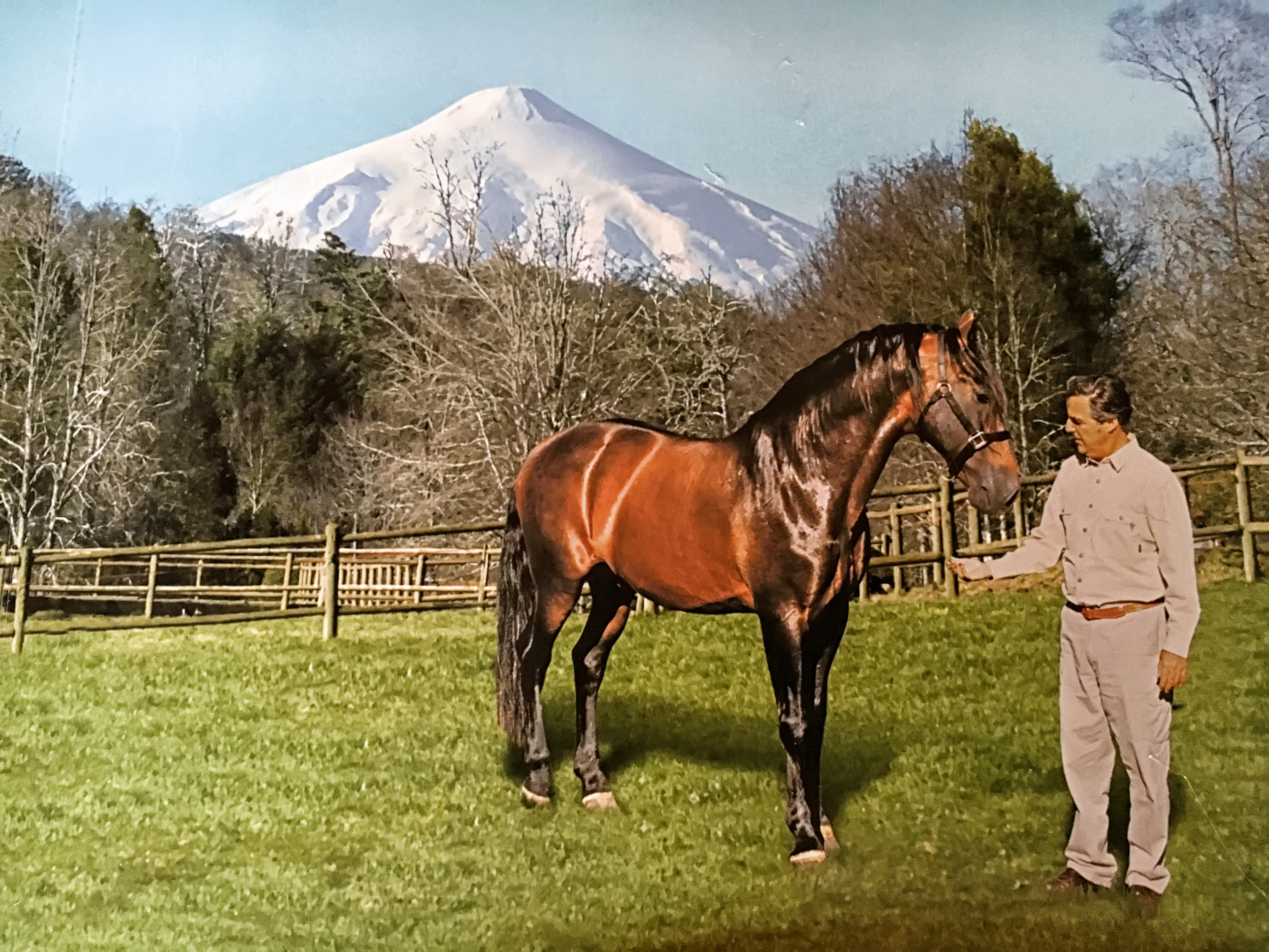 Avispado